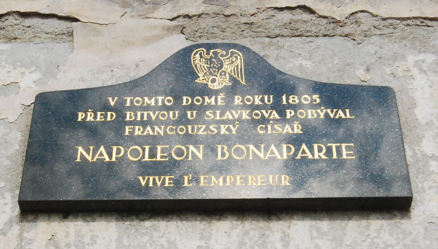 Gedenktafel für Napoleon Bonaparte, der zwei Nächte im Palais Ugart in Znojmo verbrachte